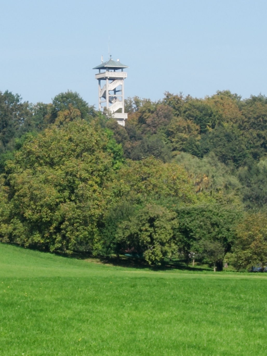 Aussichtsturm, Ludwigshöhe, Ebersberg